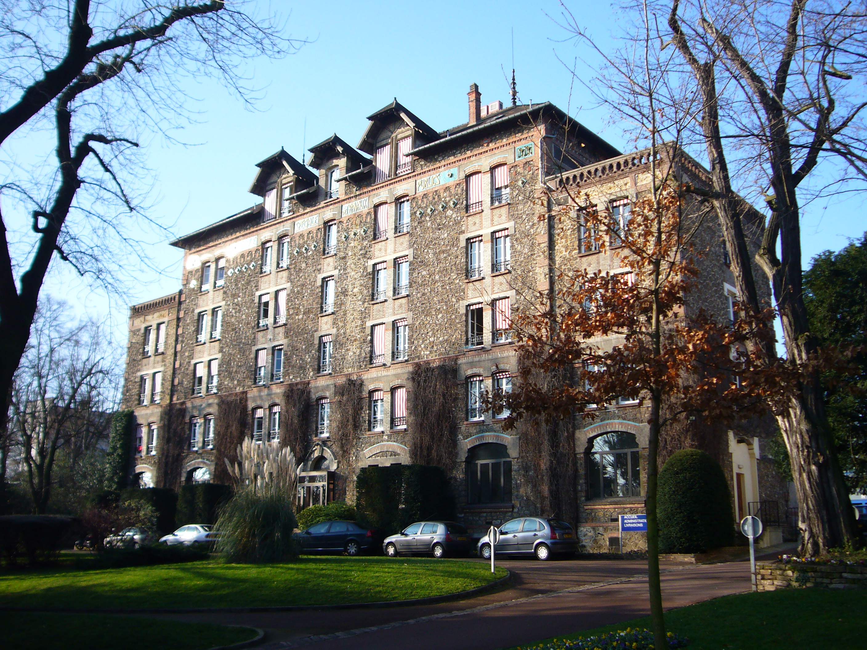 ESTP, ehem. Hauptgebäude in Cachan, heute Studentenwohnheim, 136 Zimmer mit je 8 m²